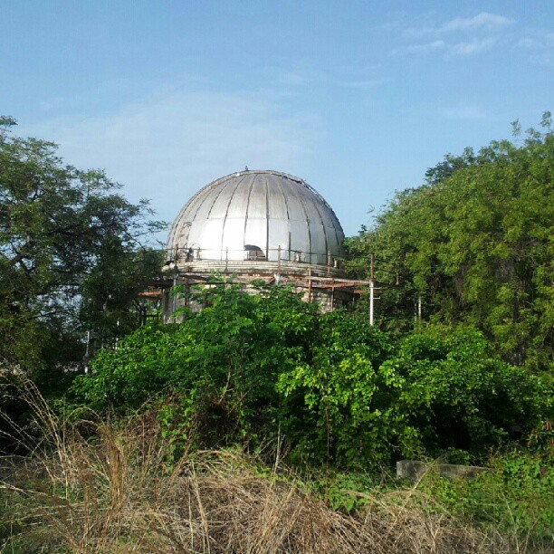 Nizamia observatory, Begumpet